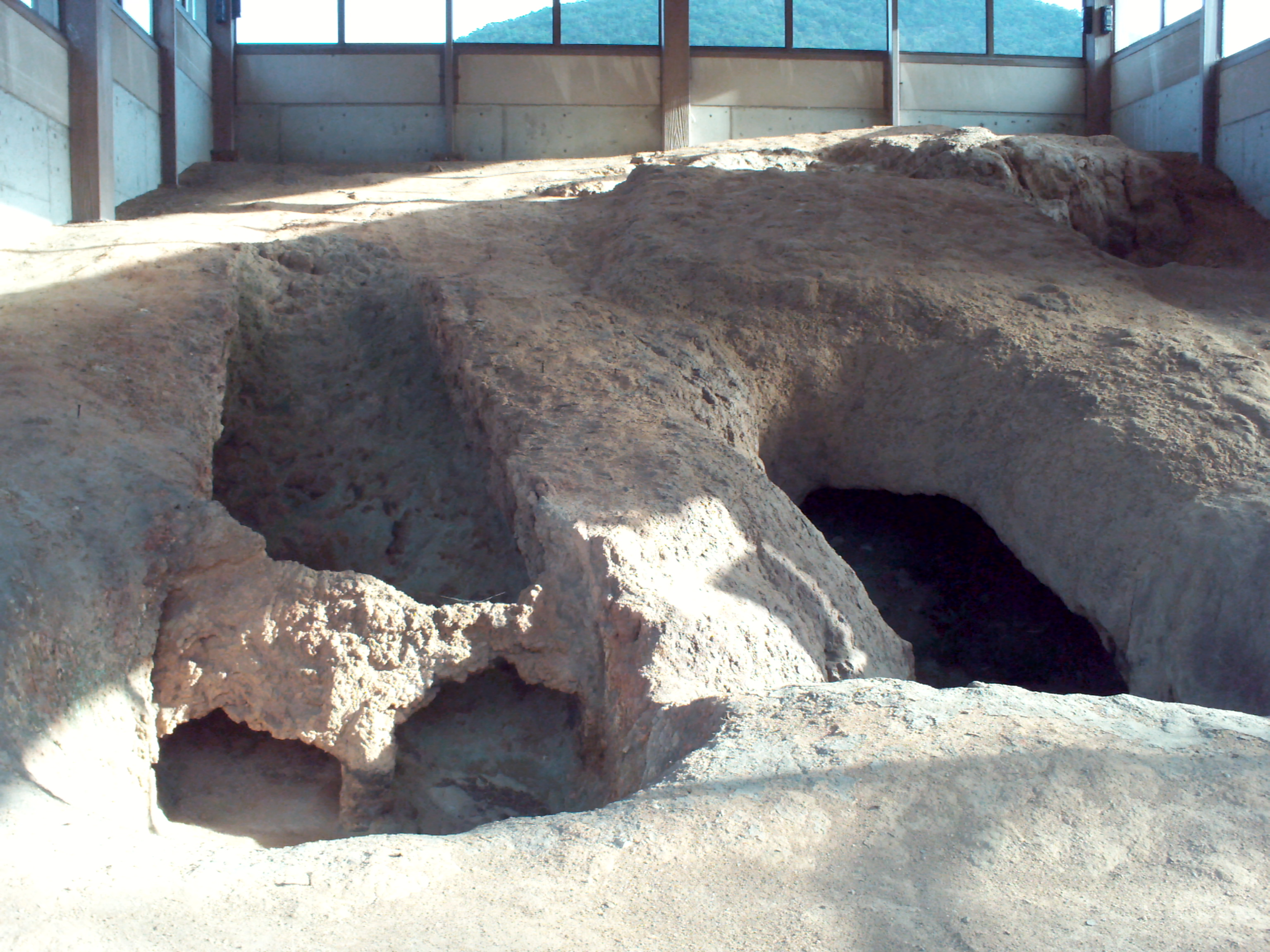 tengudani iseki（天狗谷遺跡）